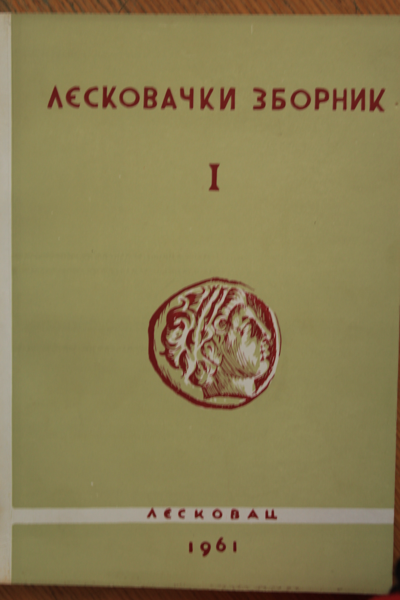 Srpski (latinica): Prvi broj leskovačkog zbornika iz 1961. godine.